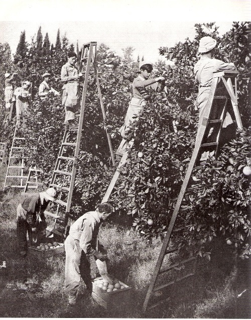 Oranges Harvest